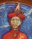 Ladislav IV. Kumán